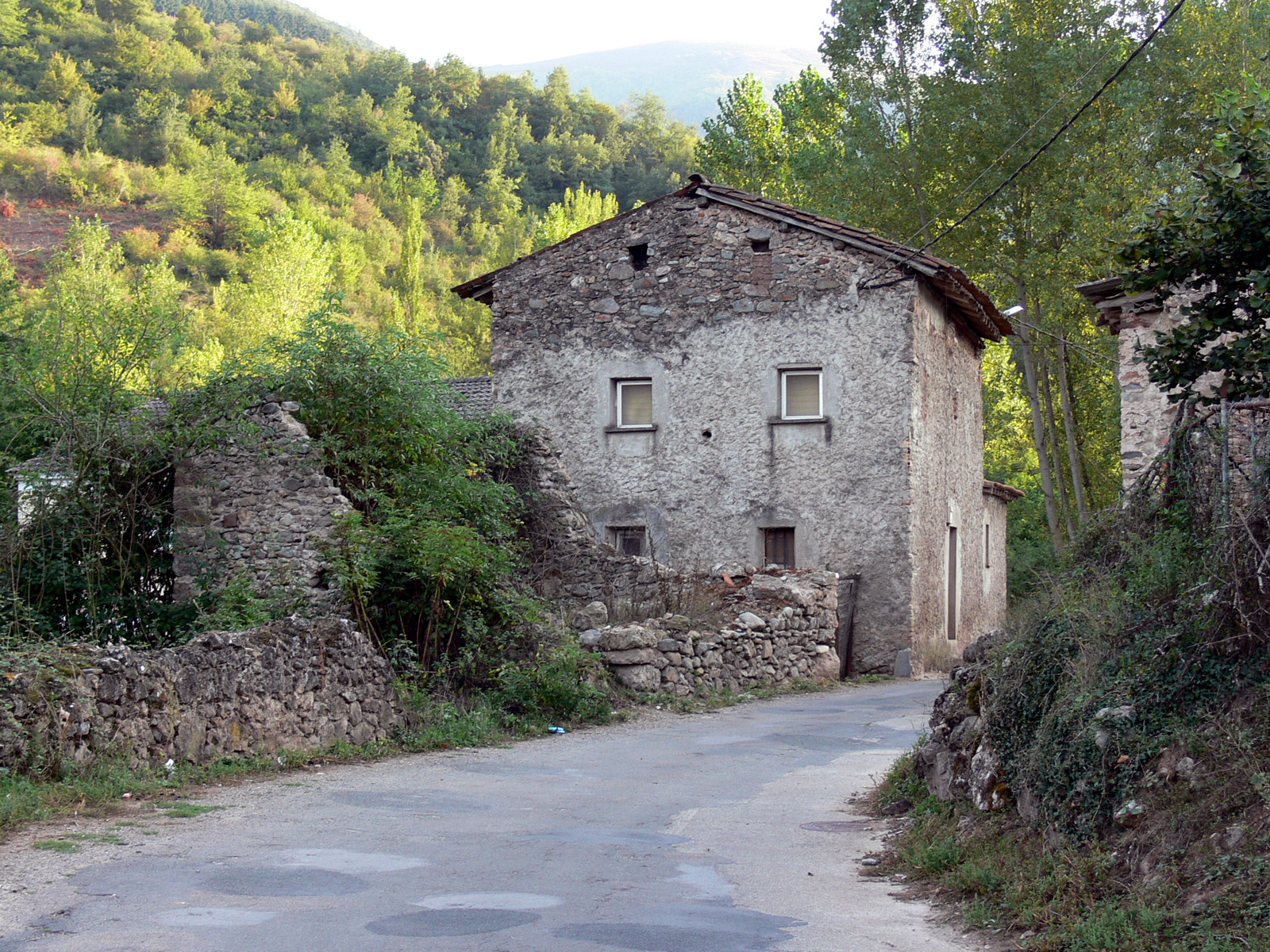 El Río, aldea de San Millán de la Cogolla (La Rioja, España)